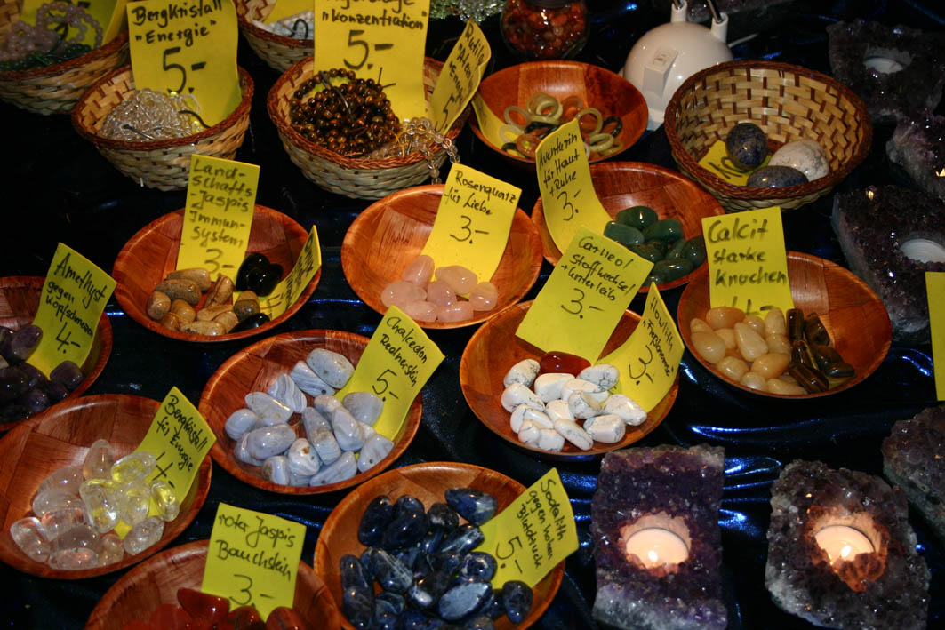 Bild von Heilsteinen by Sven Teschke 20:53, 12 Dez 2004 (UTC) on 2004-12-12